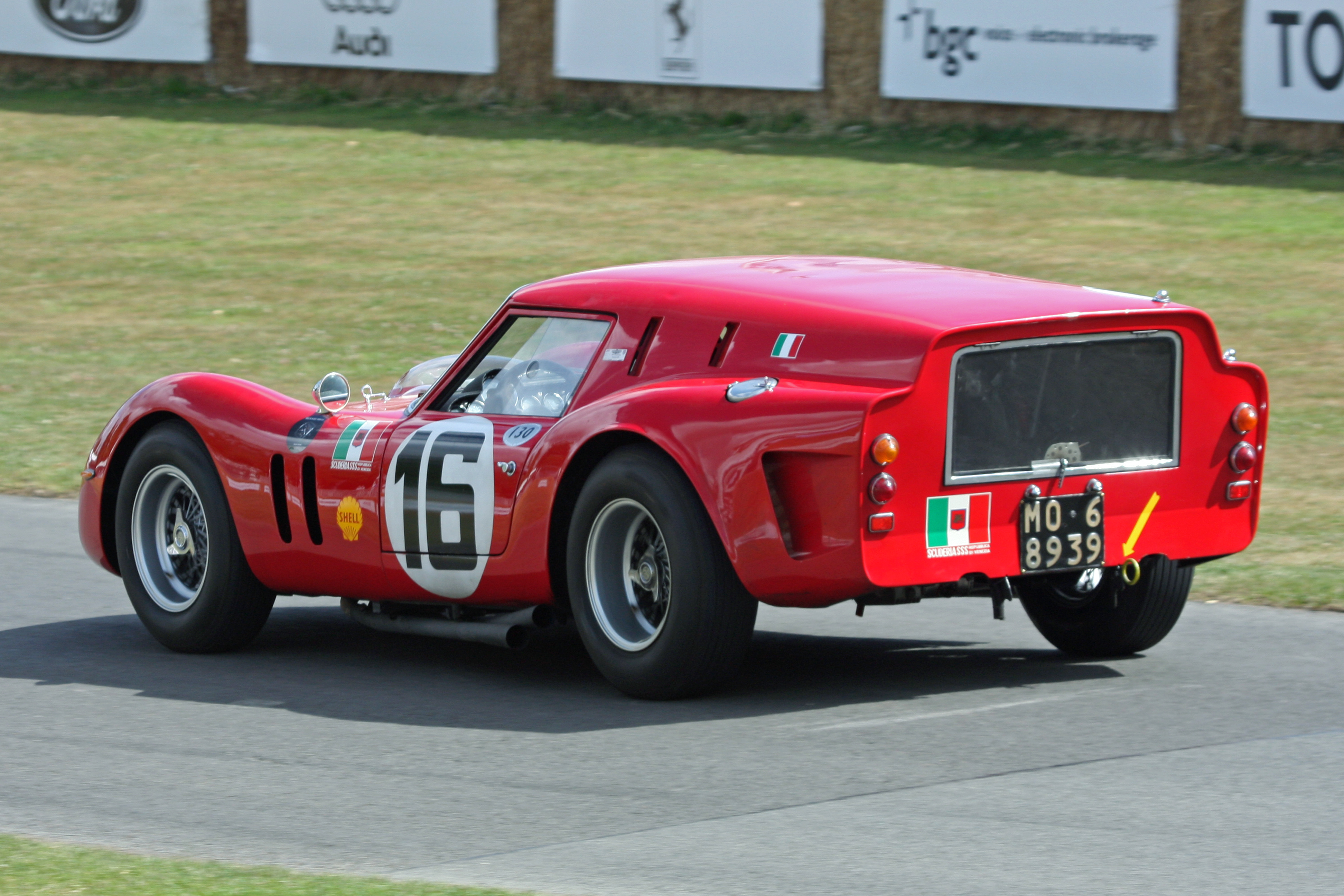 Goodwood 2009